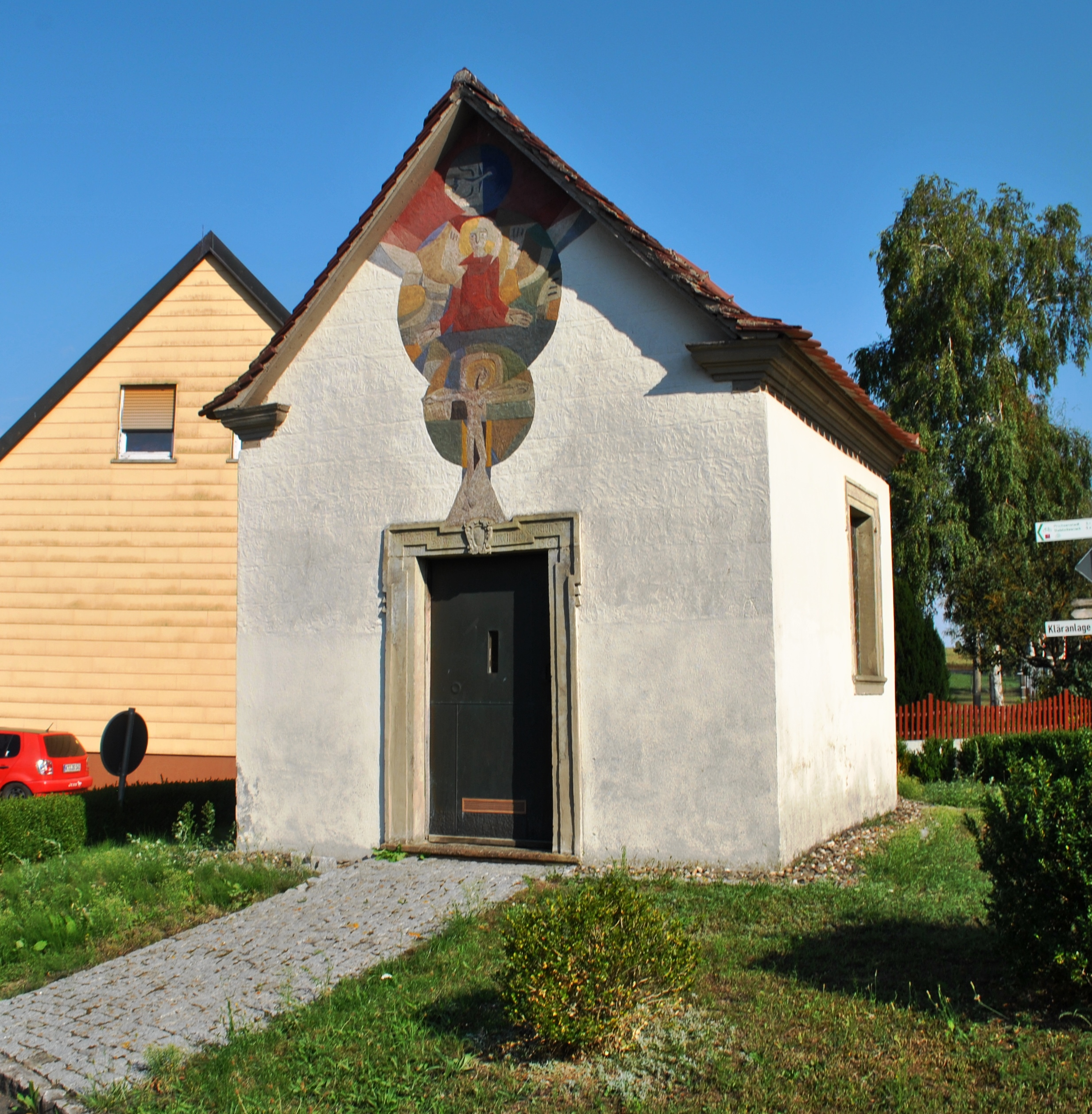 Kapelle, Zu Ehren der Dreifaltigkeit, kleiner Saalbau mit polygonalem Chorabschluss, 1736This is a photograph of an architectural monument.